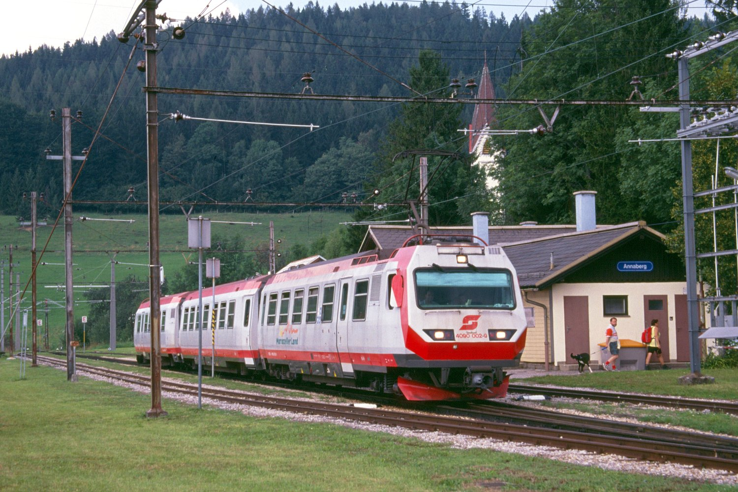 en: ÖBB Narrow gauge EMU class 4090 in Annaberg station on the Mariazellerbahn. de: Schmalspur-Triebwagenzug mit Triebkopf 4090 002 im Bahnhof Annaberg der Mariazellerbahn.